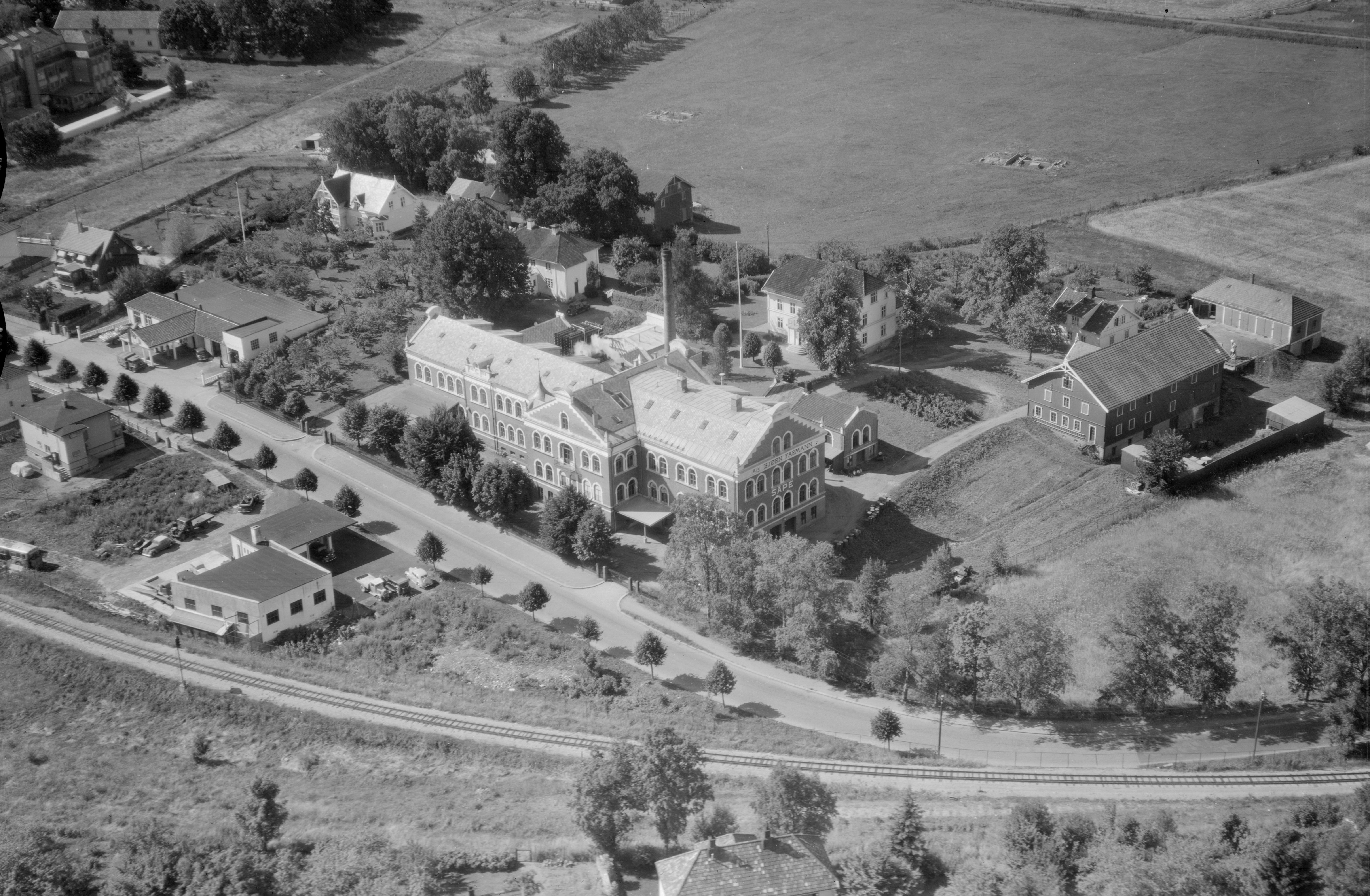 FW.S.18787